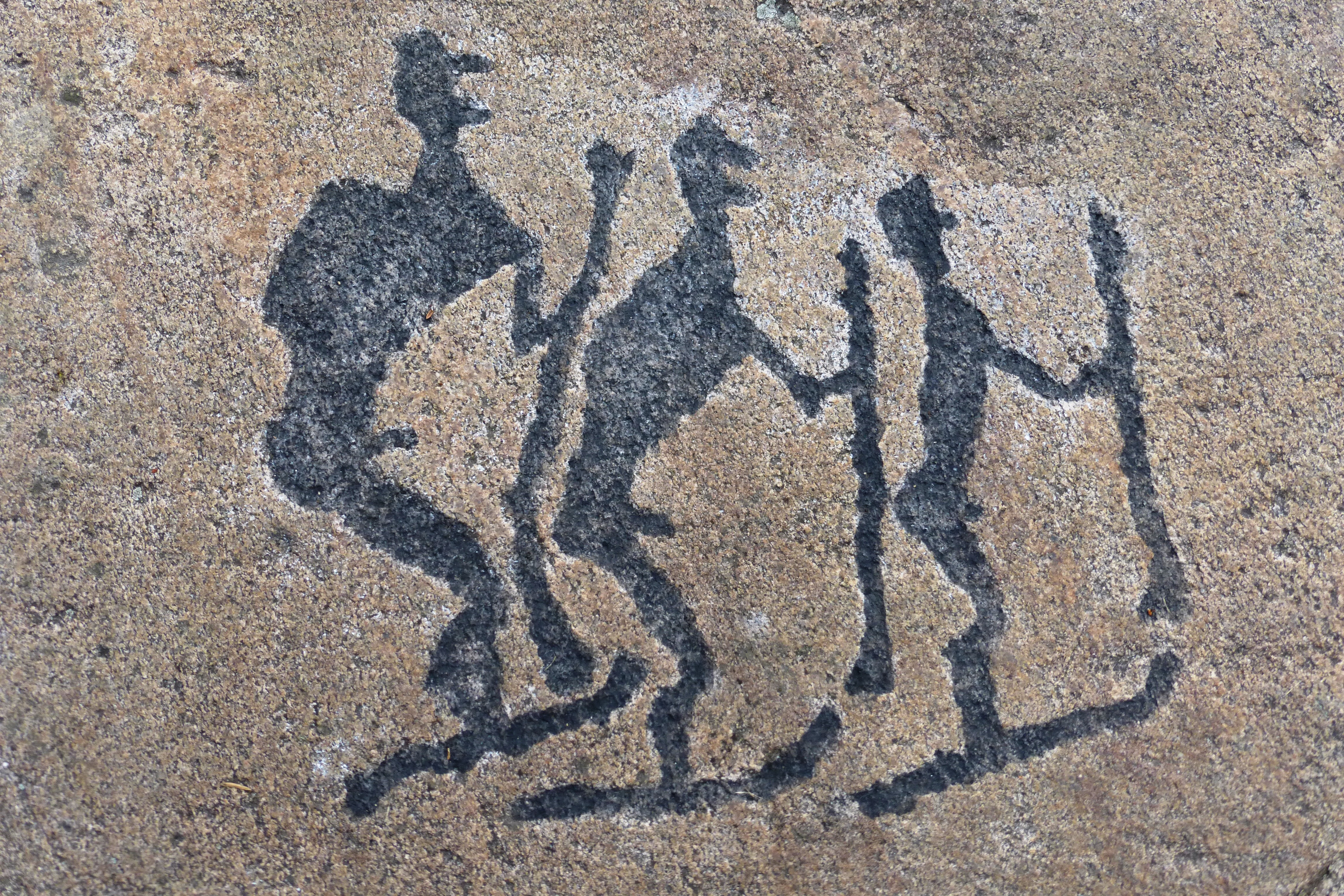 Беломорские петроглифы. (Залавруга, Беломорский район, Республика Карелия)